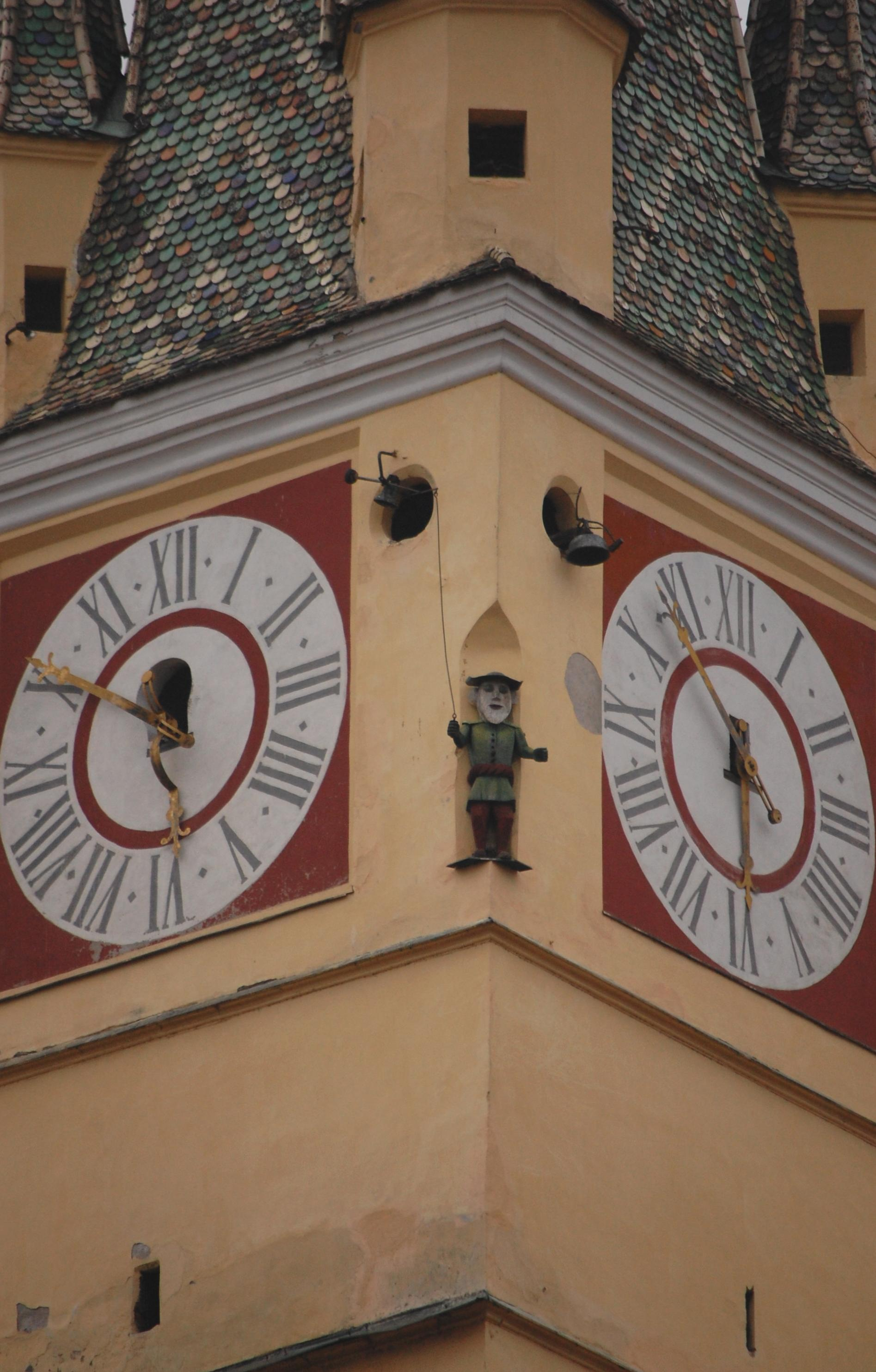 Medgyes - erődtemplom - Trombitástorony